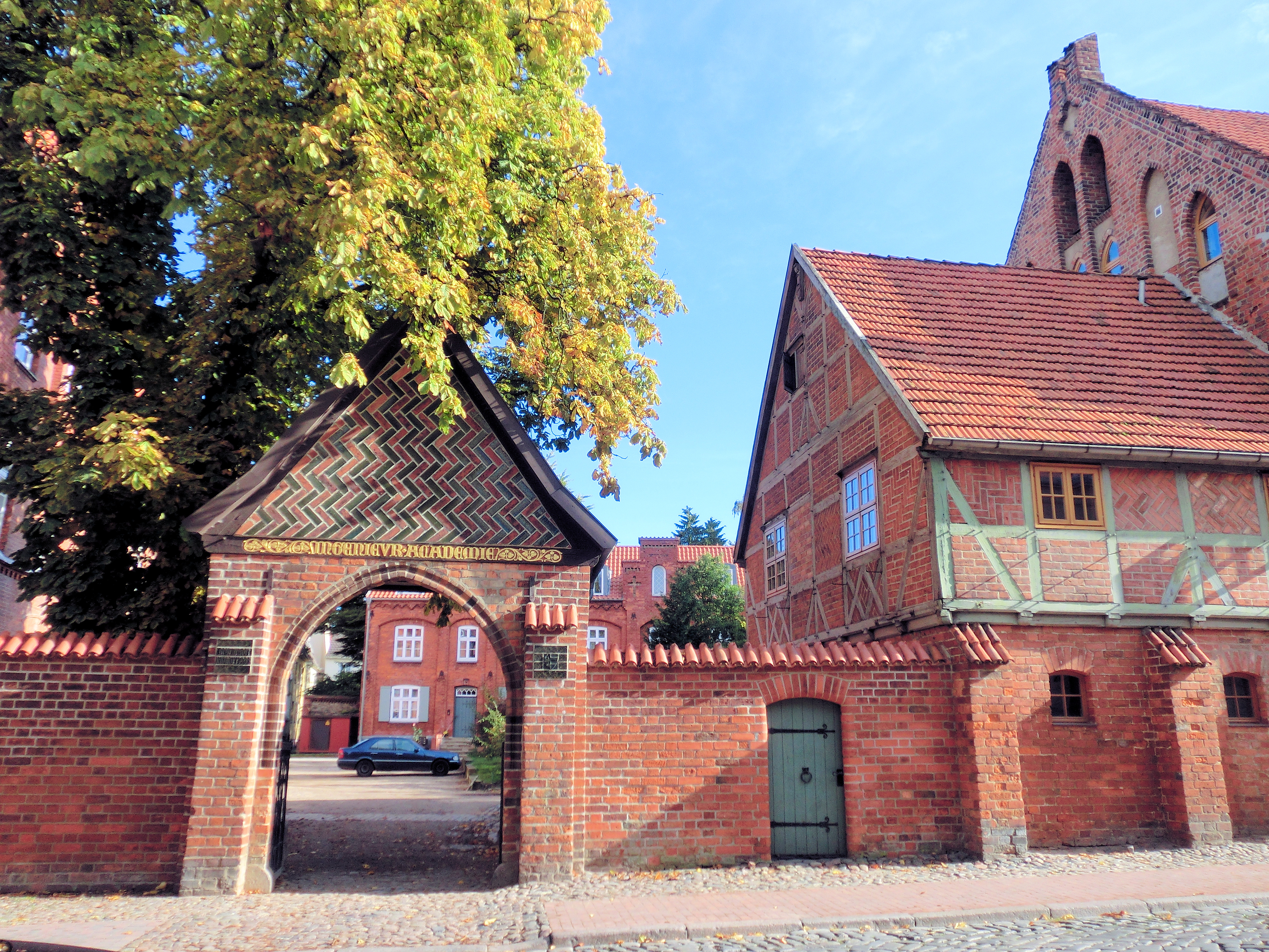 Wismar , Baudenkmal, Heiligengeist Eingang Neustadt